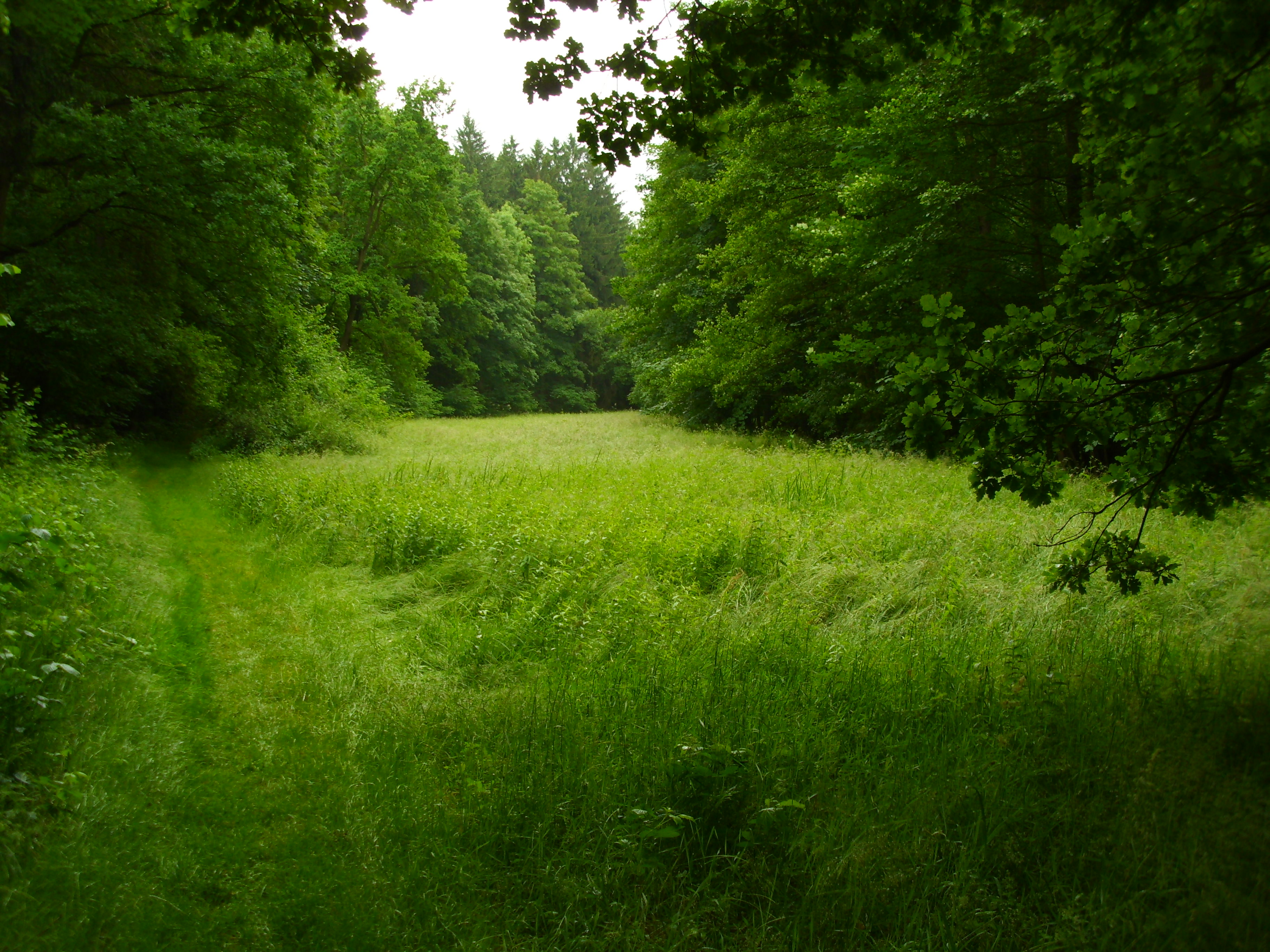 Blick in das Schwarzbachtal bei Dippoldiswalde: Der Grund liegt bei Dippoldiswalde und steht teilwese unter Naturschutz